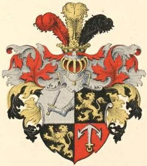 Klugeni suguvõsa aadlivapp